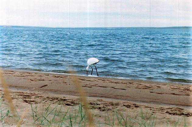 Птица колпица на фоне озера Торе-Холь